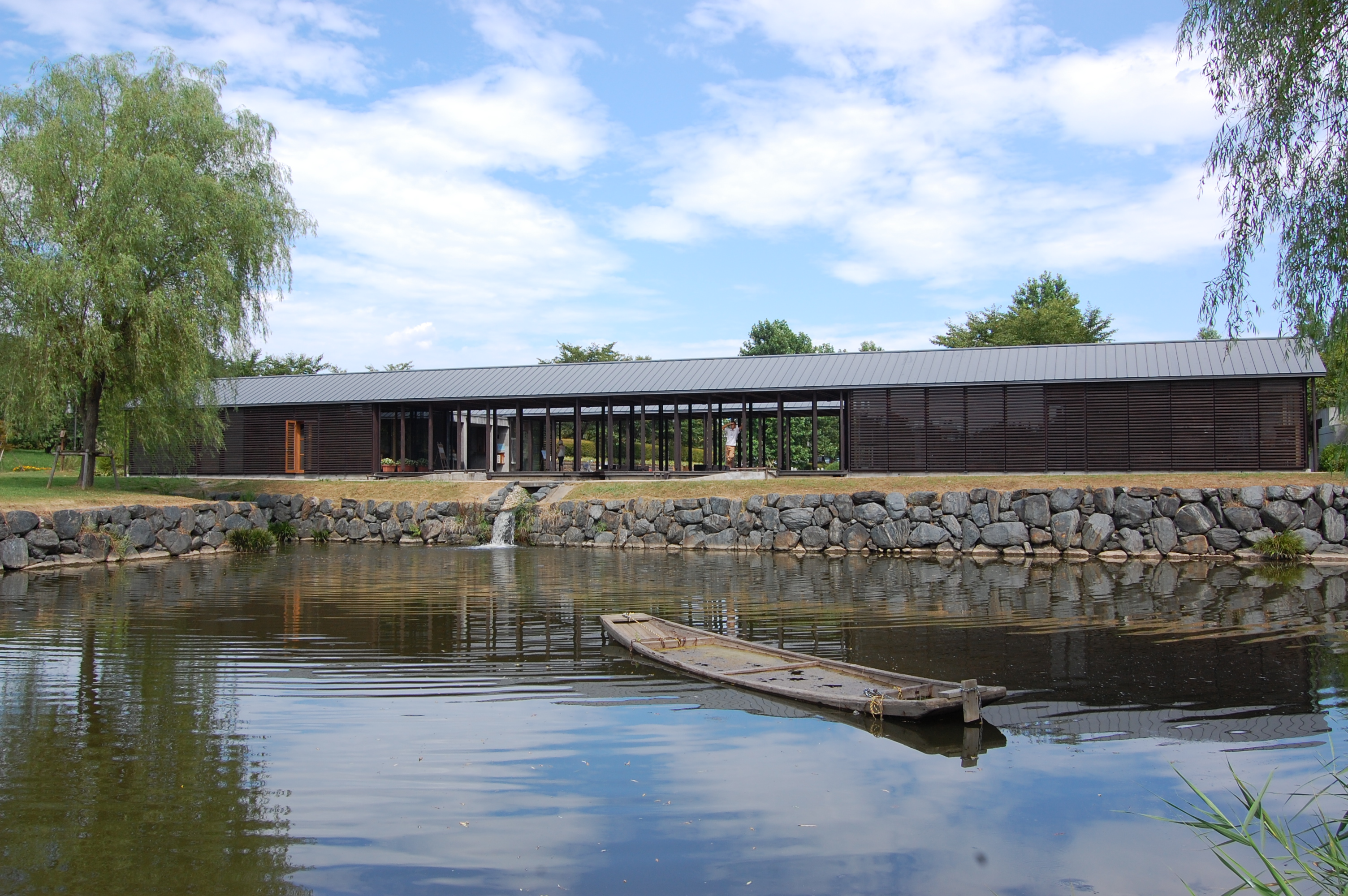 Visitors' Center of Koga Muncipal Park, Koga Ibaragi Japan, Design by Hiroshi Naito